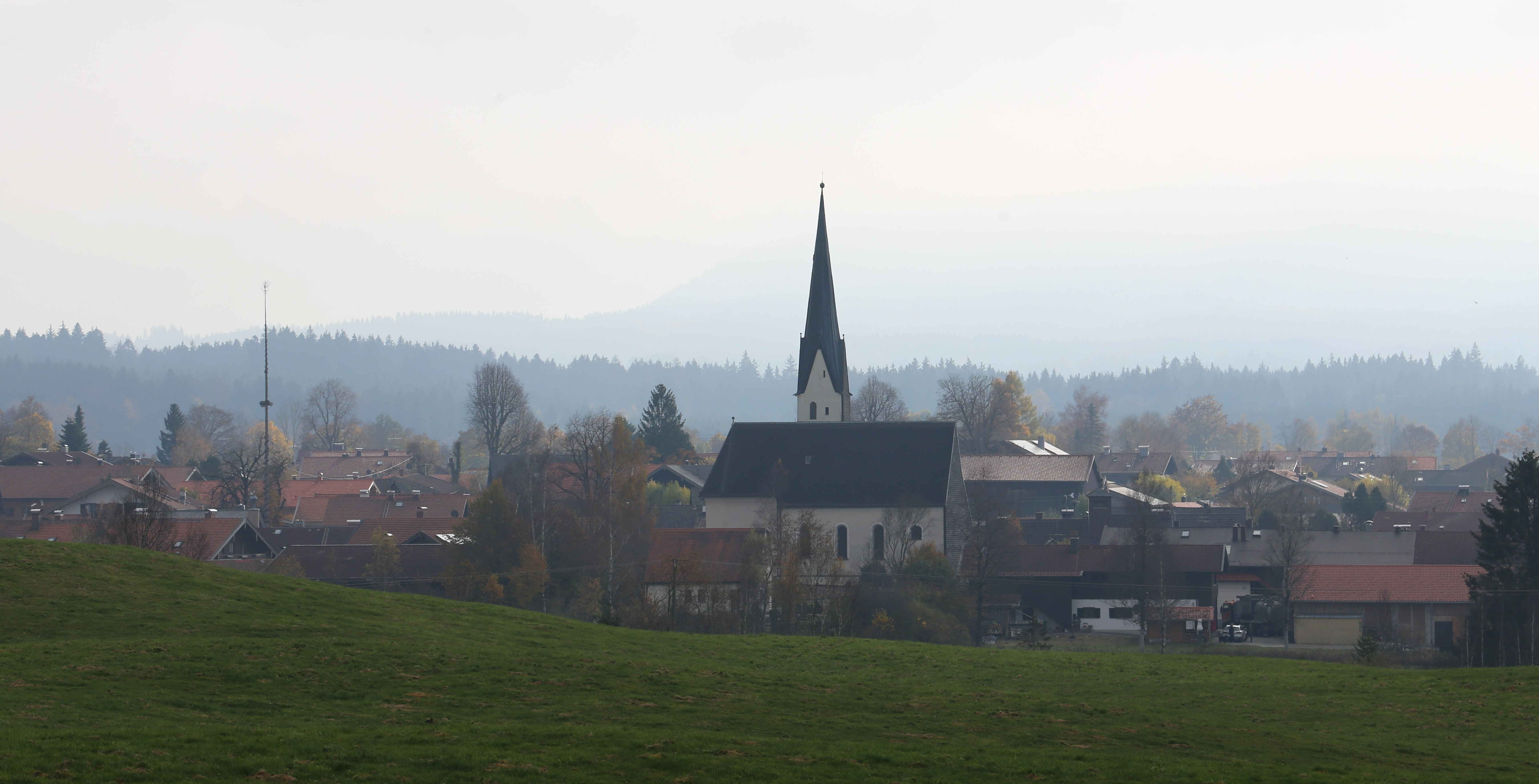 Blick von Kloster Reutberg auf Sachsenkam